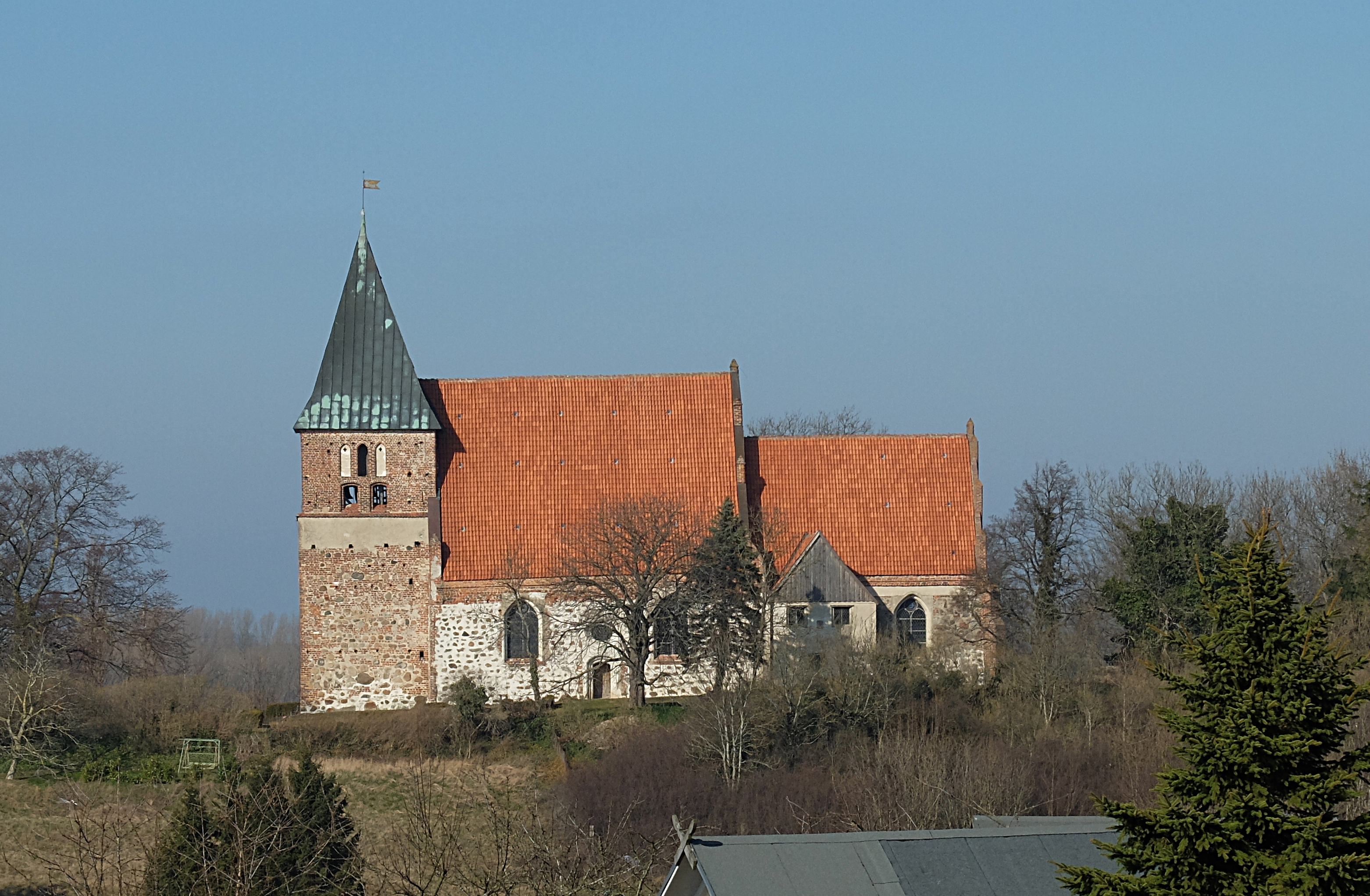 Wallfahrtskirche St. Pauli in Bobbin, Rügen